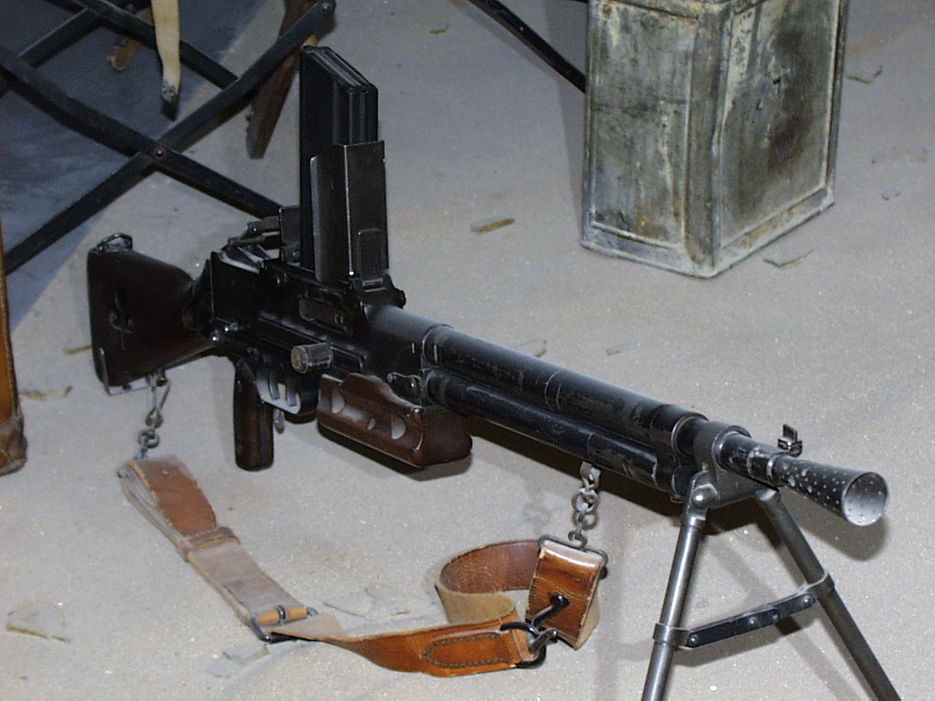 FM 24/29 automatic rifle at Musée de l'Armée in Paris